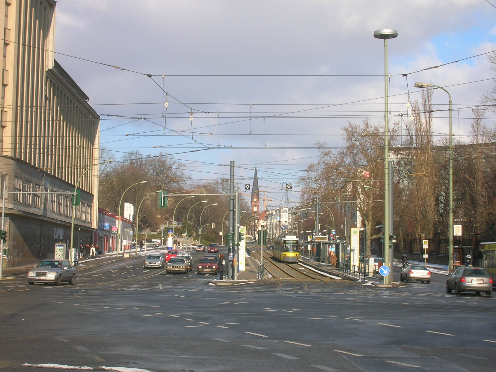 Berlin, Prenzlauer Allee, gesehen vom Prenzlauer Tor photo taken by Mazbln on February 4, 2006